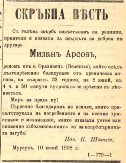 Известие за смъртта на Милан Арсов, Новини, 1908